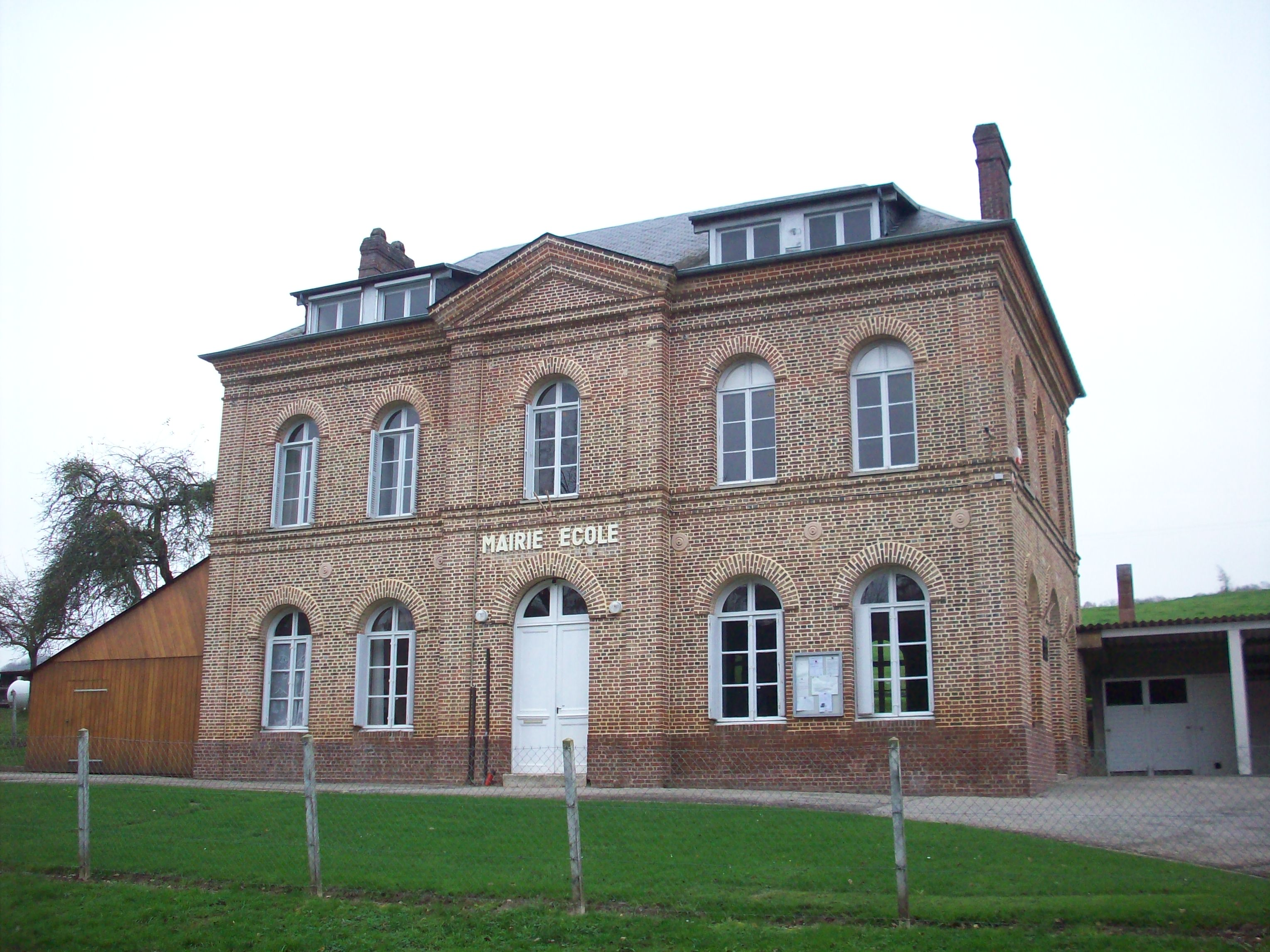 Mairie-école du Héron, au hameau du Mesnil.